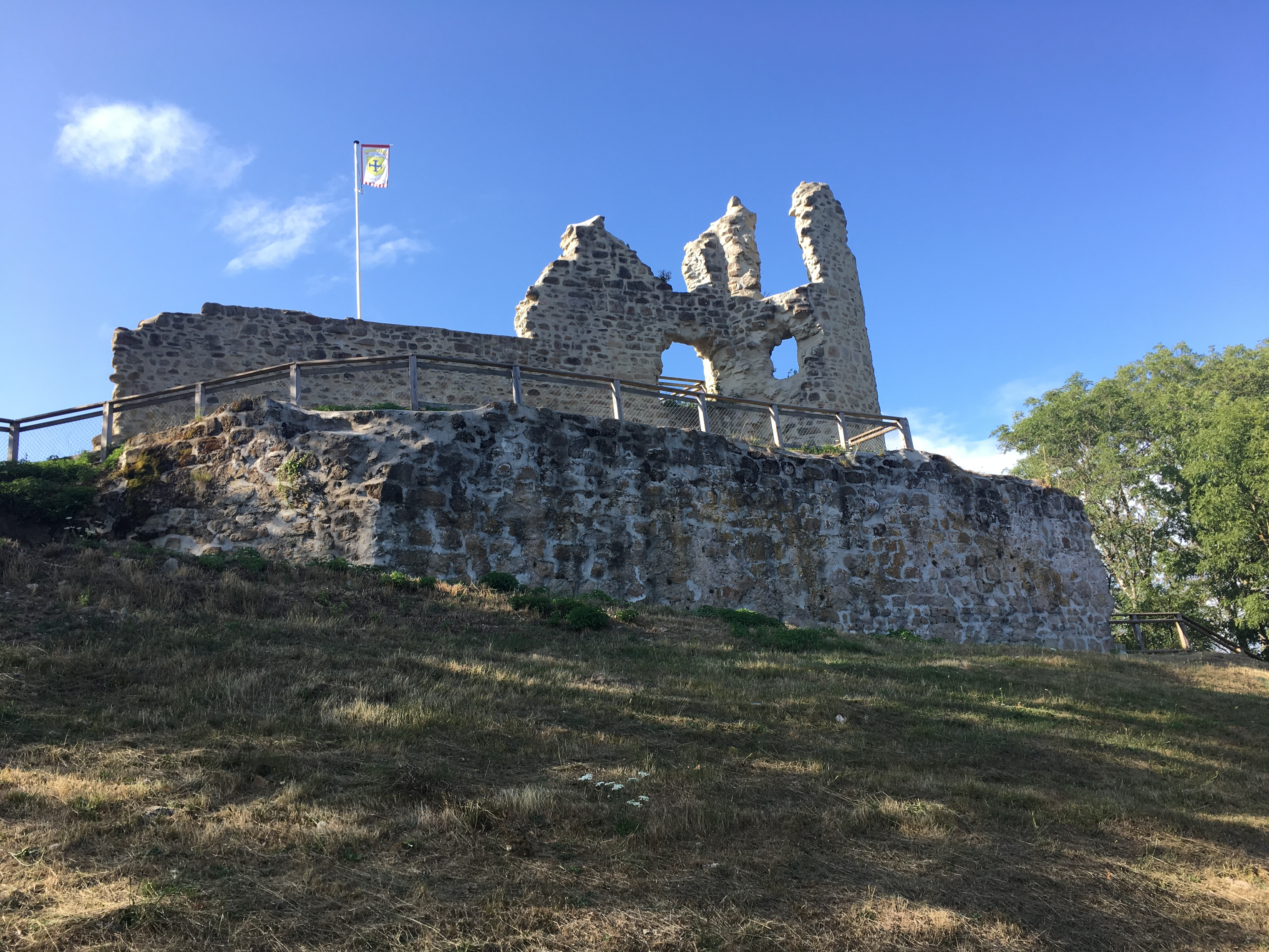 Ruine du château de Thynière